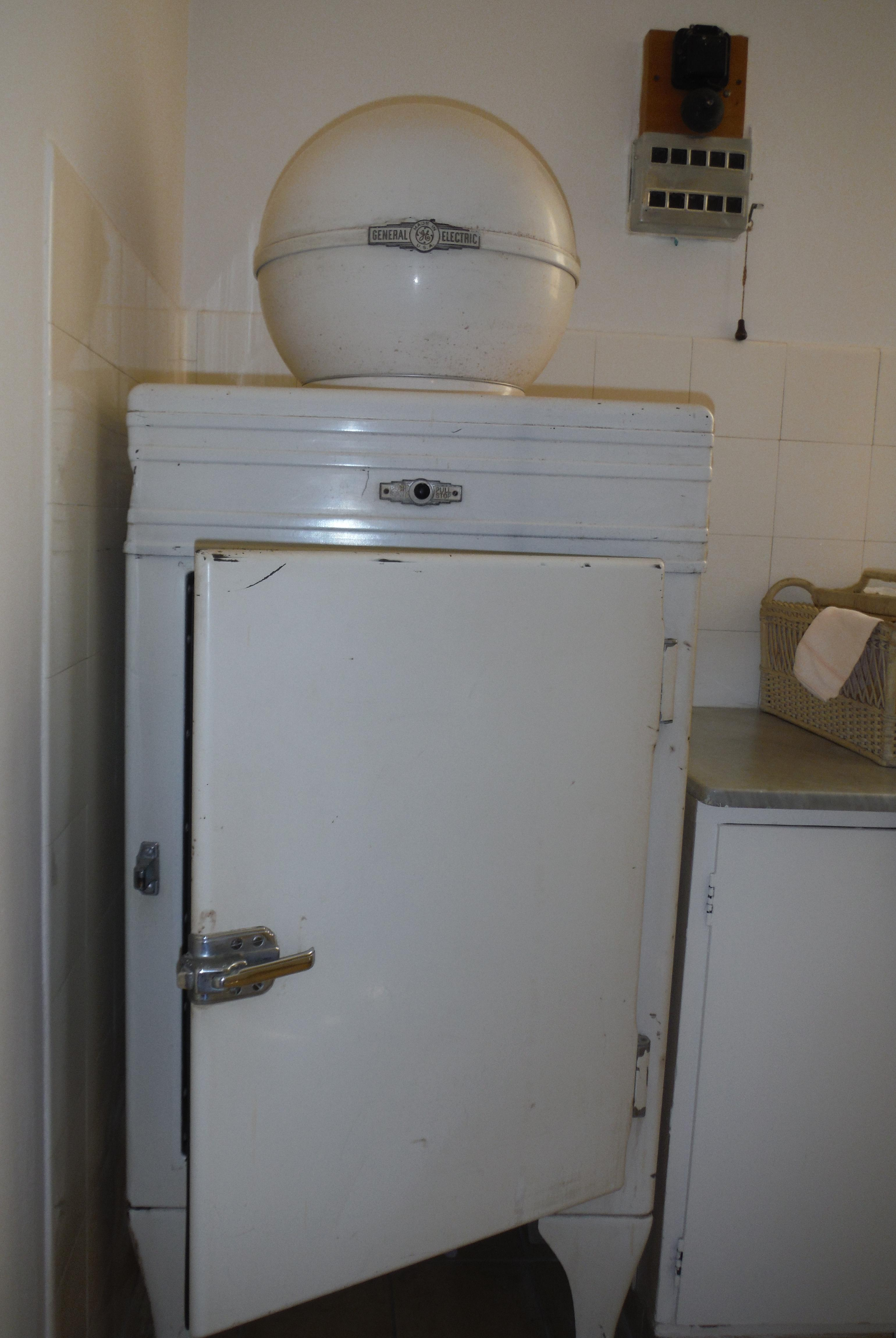 מקרר ג'נרל אלקטריק 1942, מדחס חיצוני עליון, בבית הנשיא חיים ויצמן